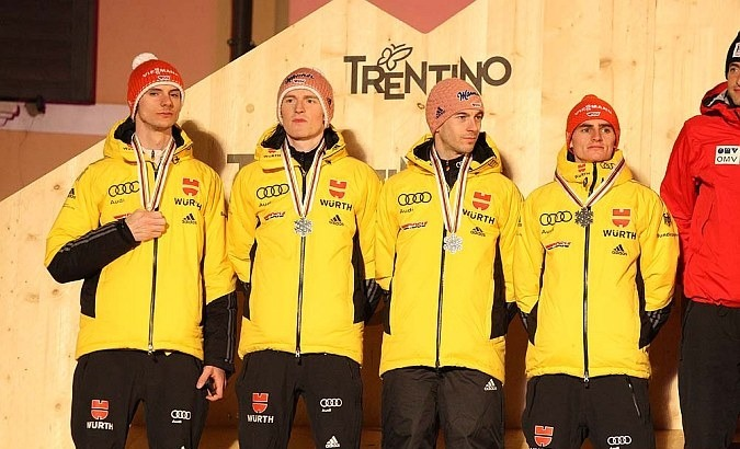 Dekoracja medalowa konkursu drużynowego mężczyzn na skoczni K-120